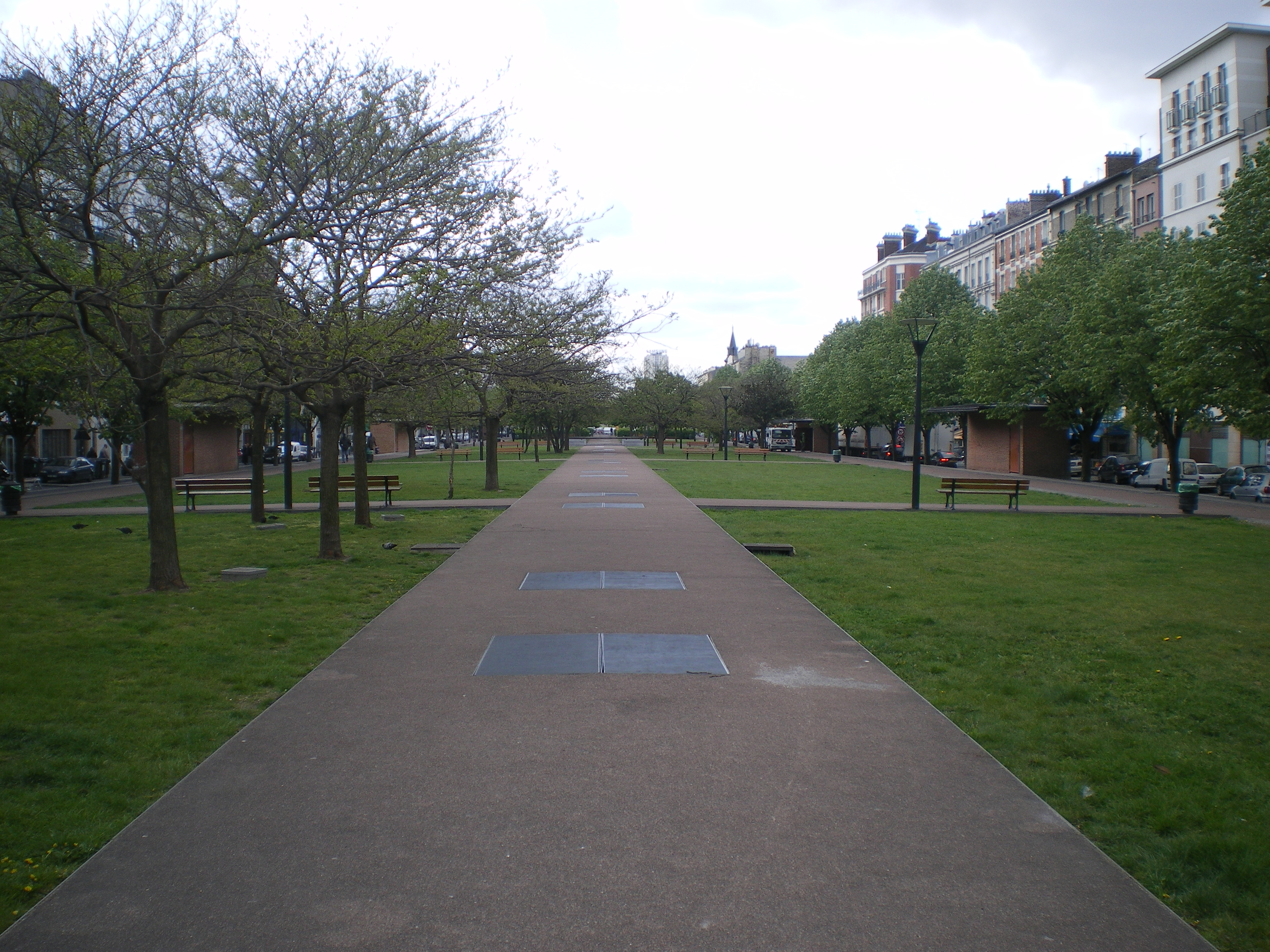 Allée de l'espace vert au dessus du tunnel du Landy. Elle est parsemée de grilles d'aération du tunnel sous-jacent.